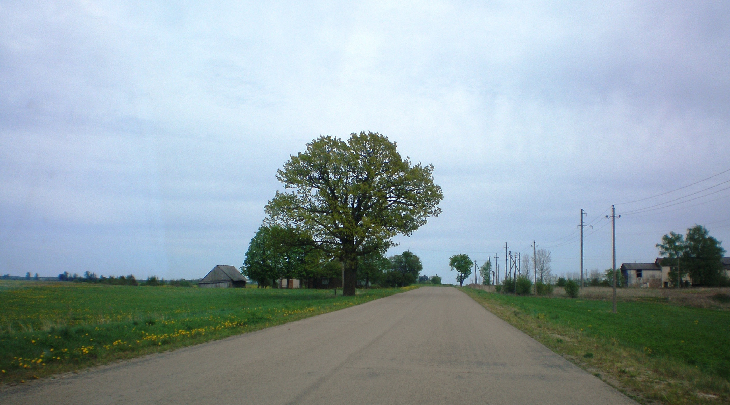 Digraičiai, Krakių sen., Kėdainių raj.